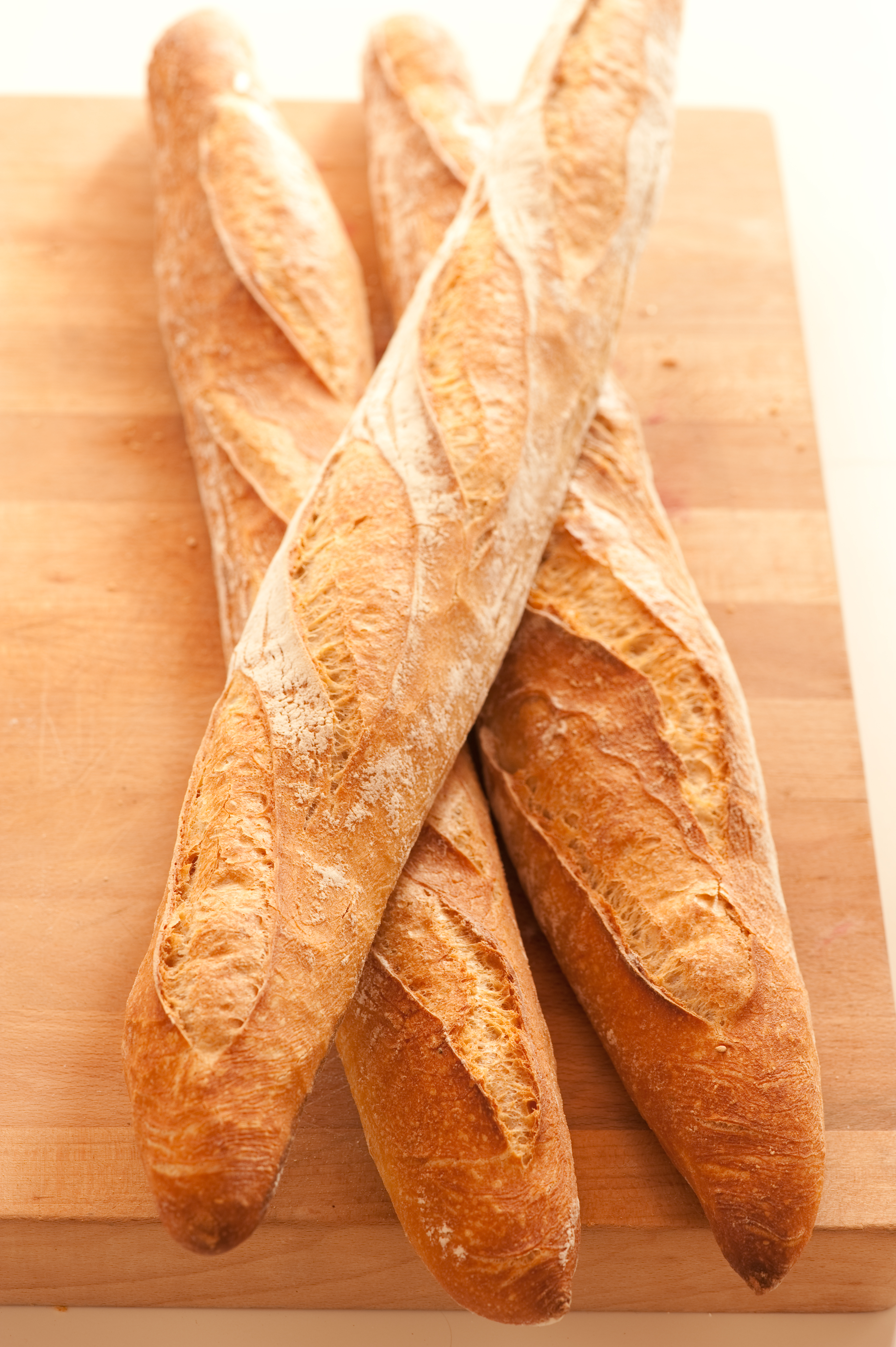 3 baguettes